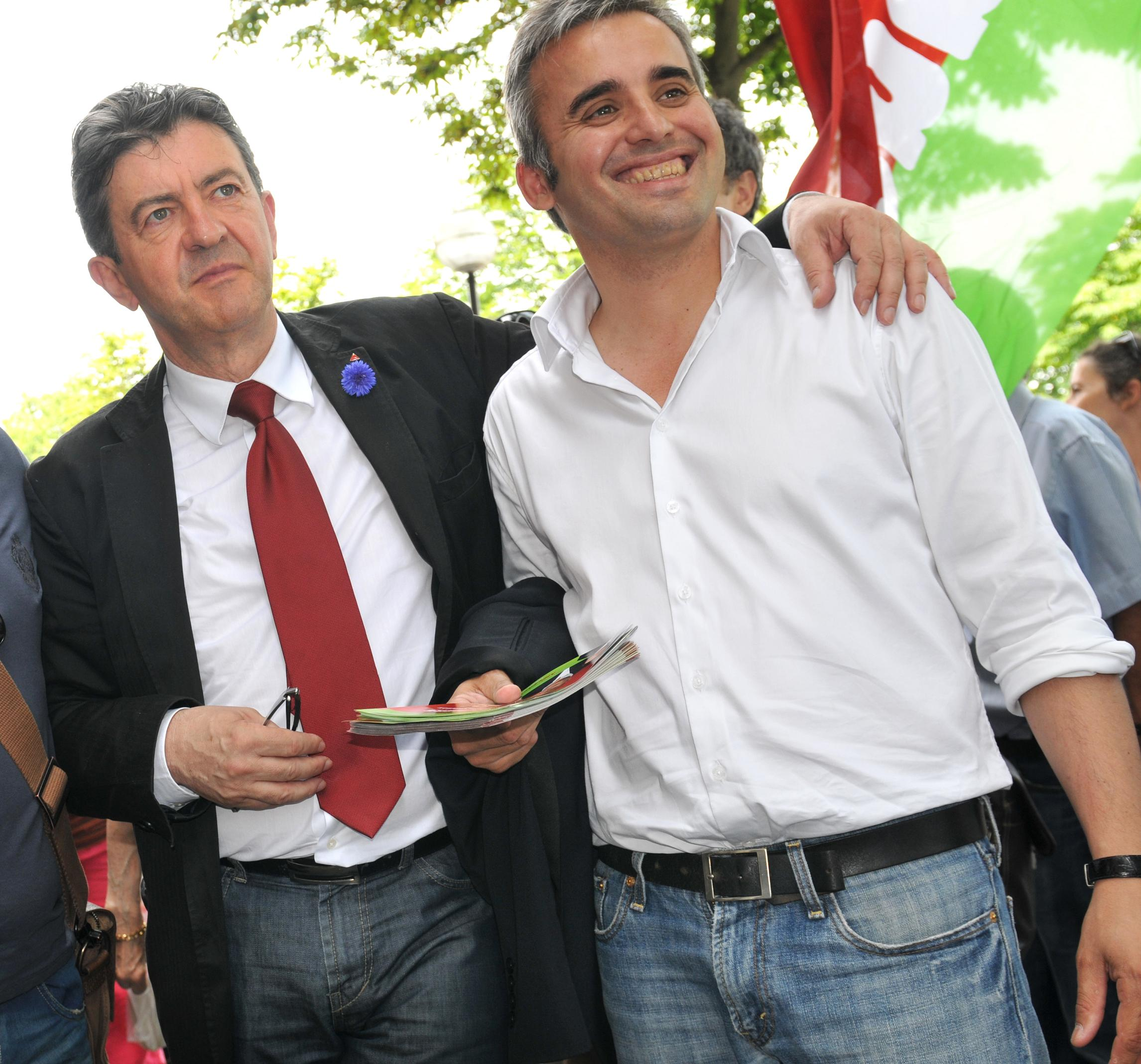 Alexis Corbière, secrétaire national du PG, en compagnie de Jean-Luc Mélenchon, campagne législatives Paris 12e, 30 mai 2012